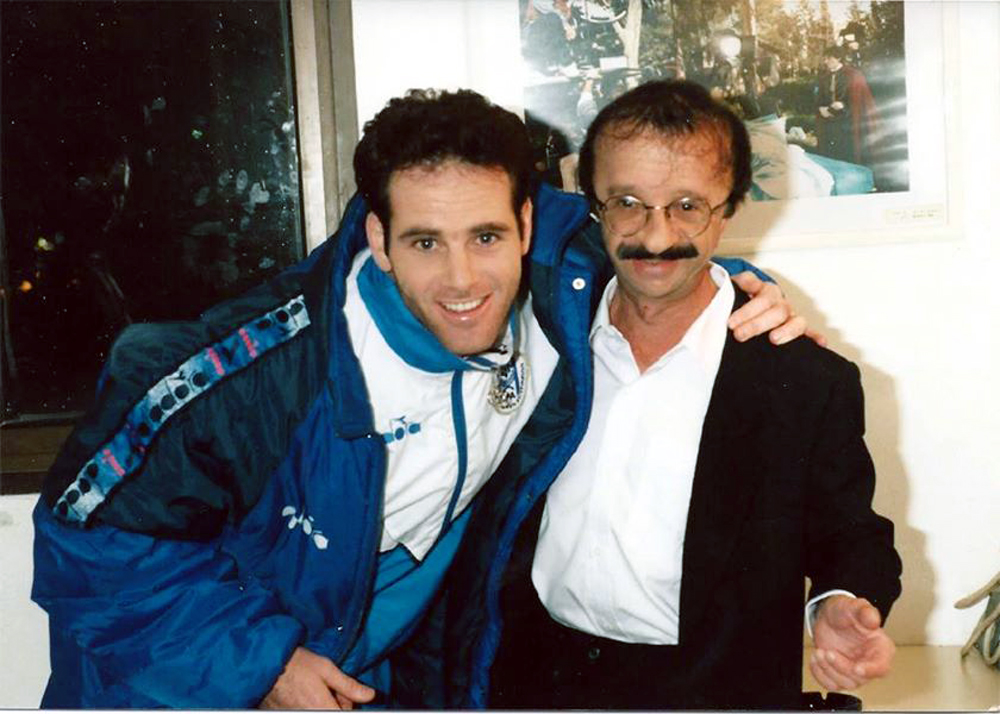 דובי גל ובוני גינסבורג